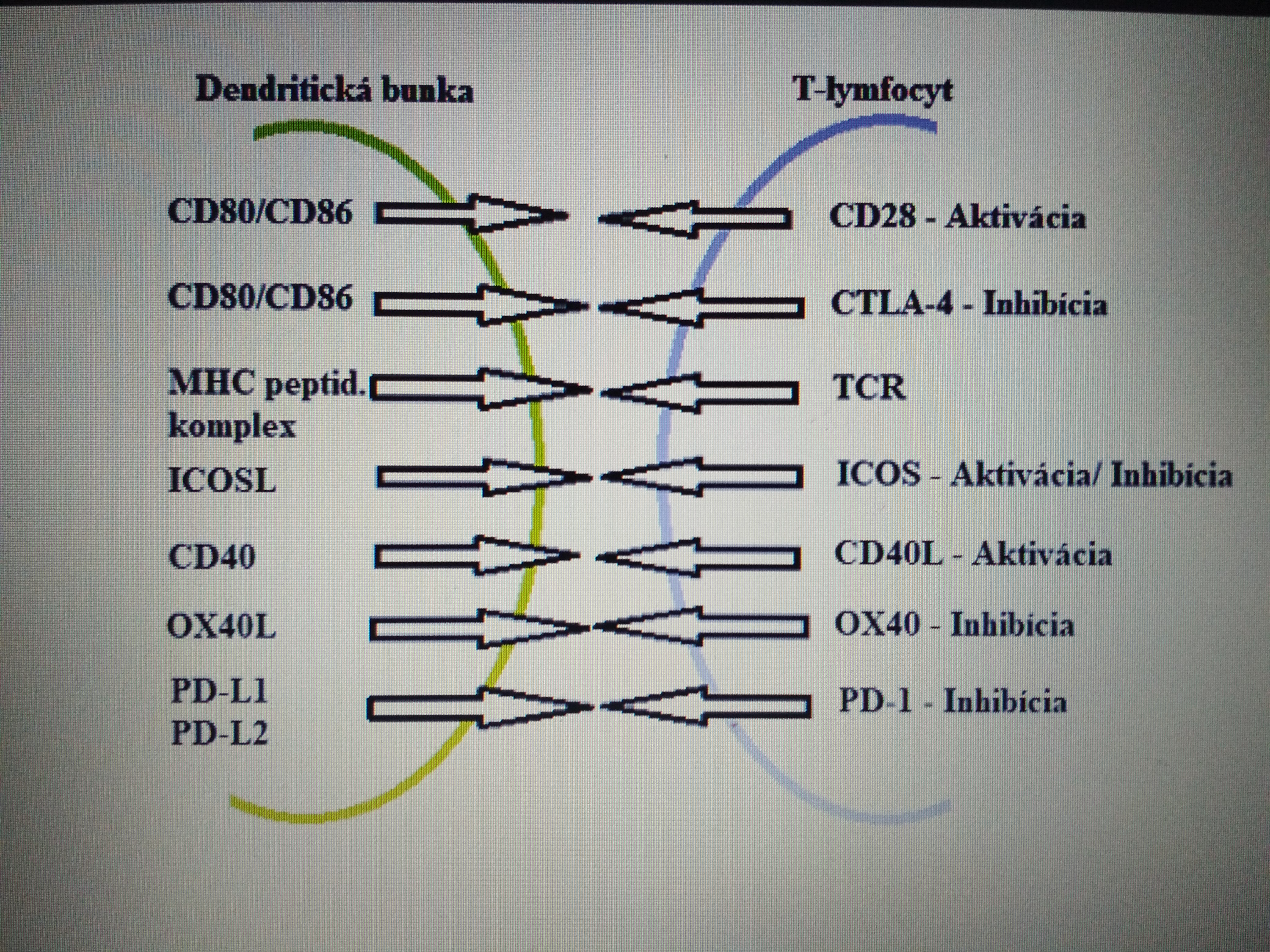 Interakcia medzi jednotlivými molekulami v kostimulácii.